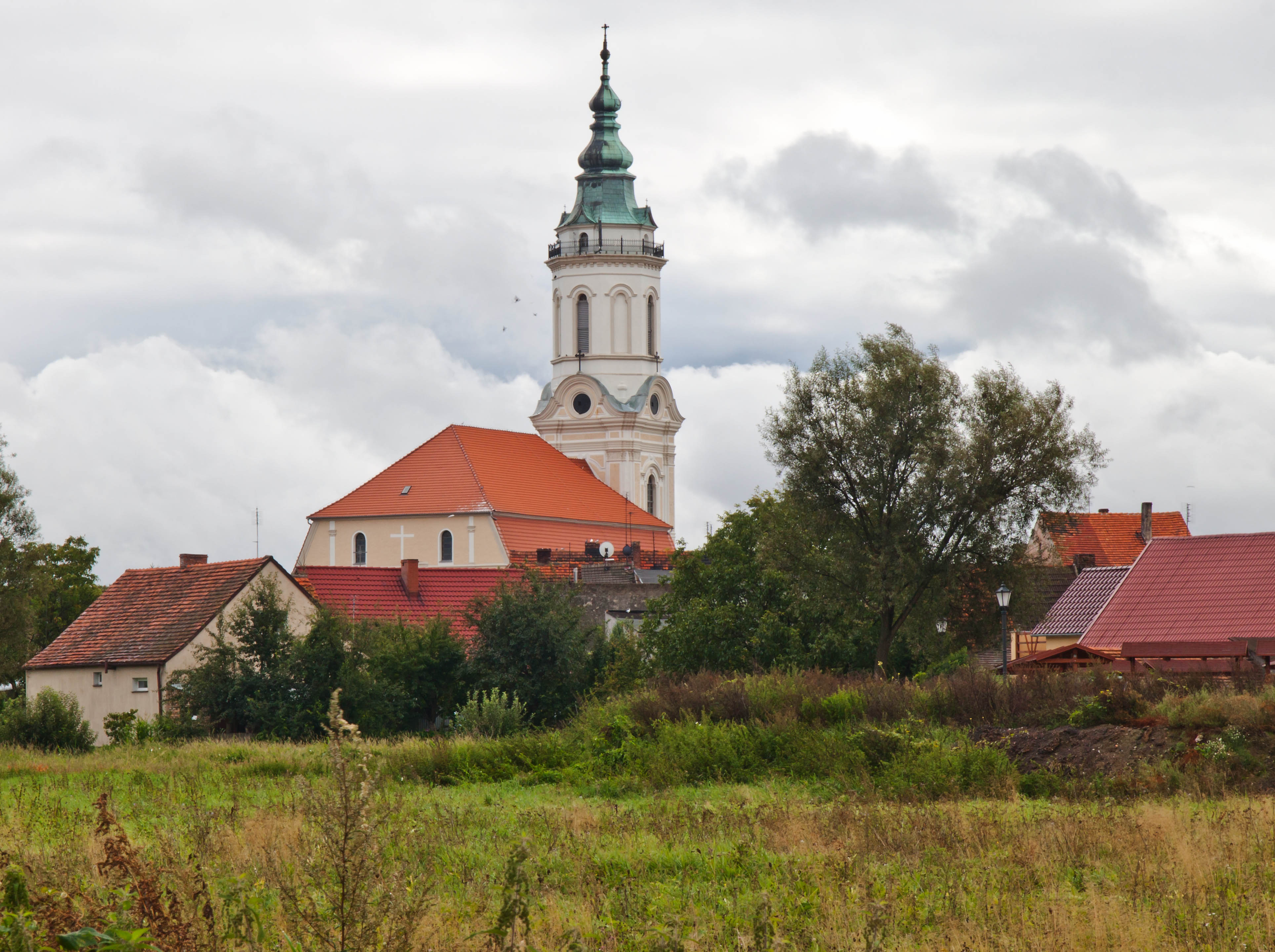 Nowe Miasteczko, pl. 3 Maja - dawny kościół ewangelicki, obecnie rzymskokatolicki filialny p.w. Opatrzności Bożej, mur., 1783-1784, 1887-1888, 1990 (zabytek nr 1541 z 15.02.1965)